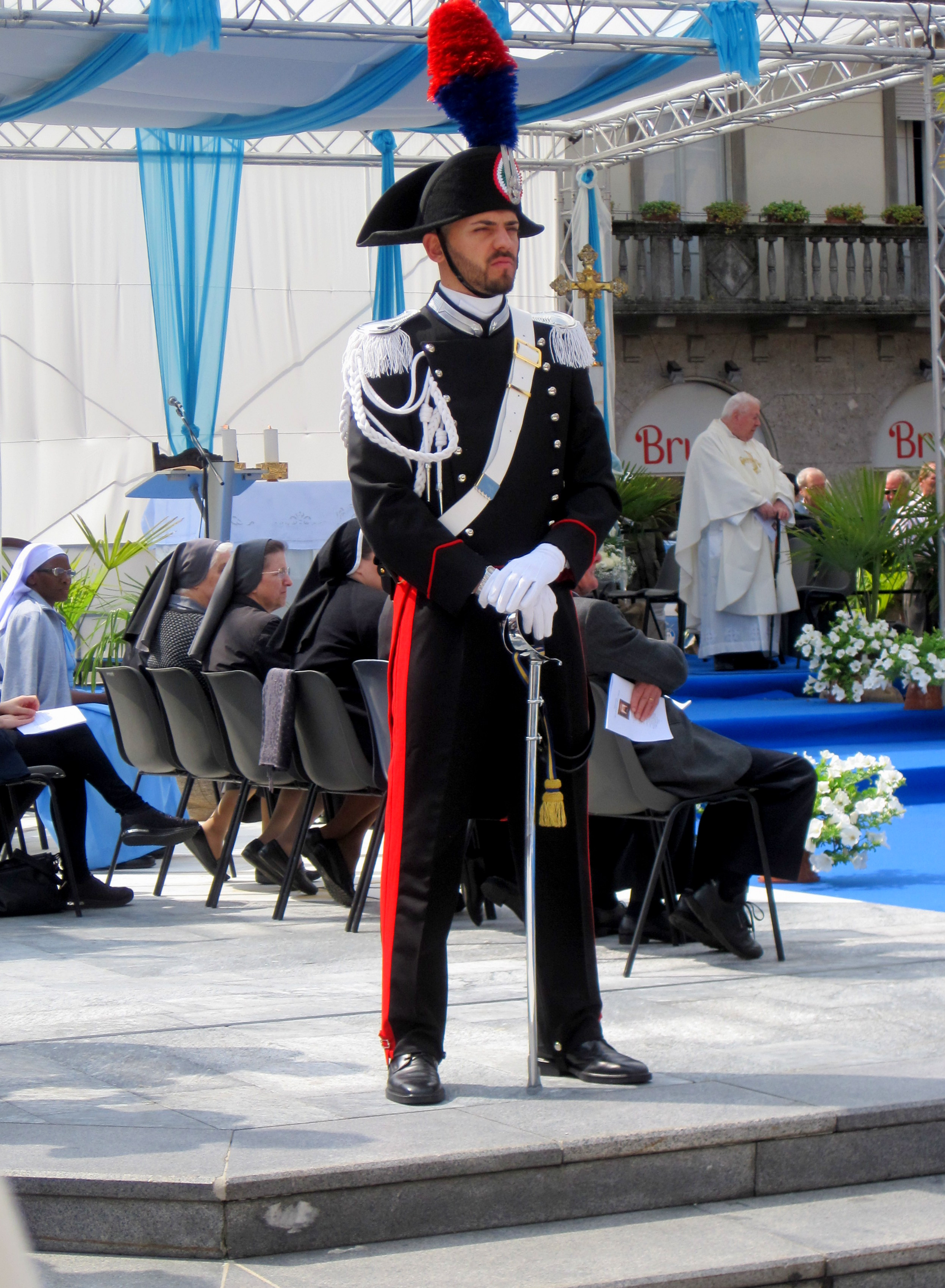 La piazza di Santa Maria a Busto Arsizio durante il cinquecentenario del santuario. This is a photo of a monument which is part of cultural heritage of Italy.